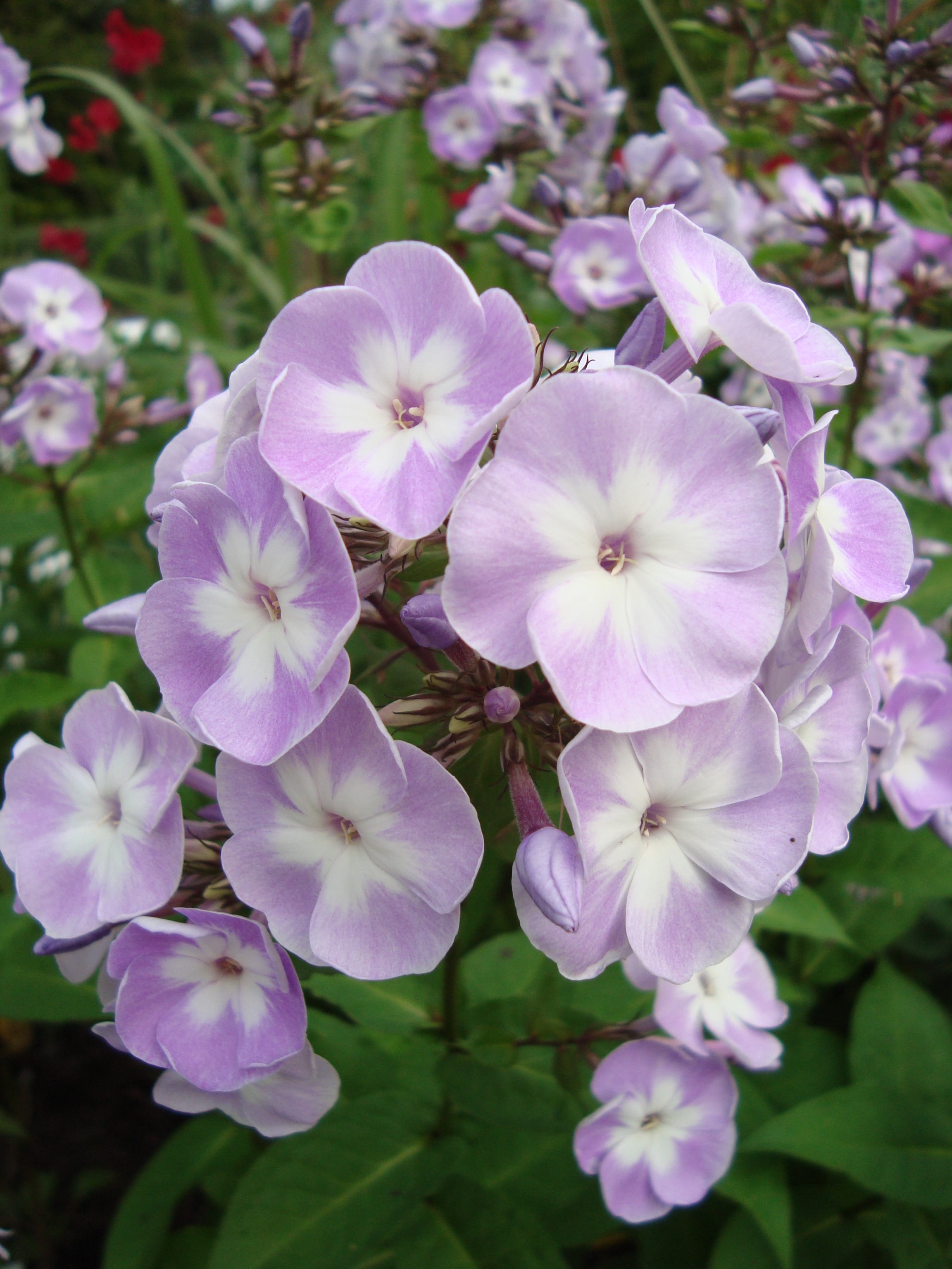 Phlox paniculata 'Katherine'